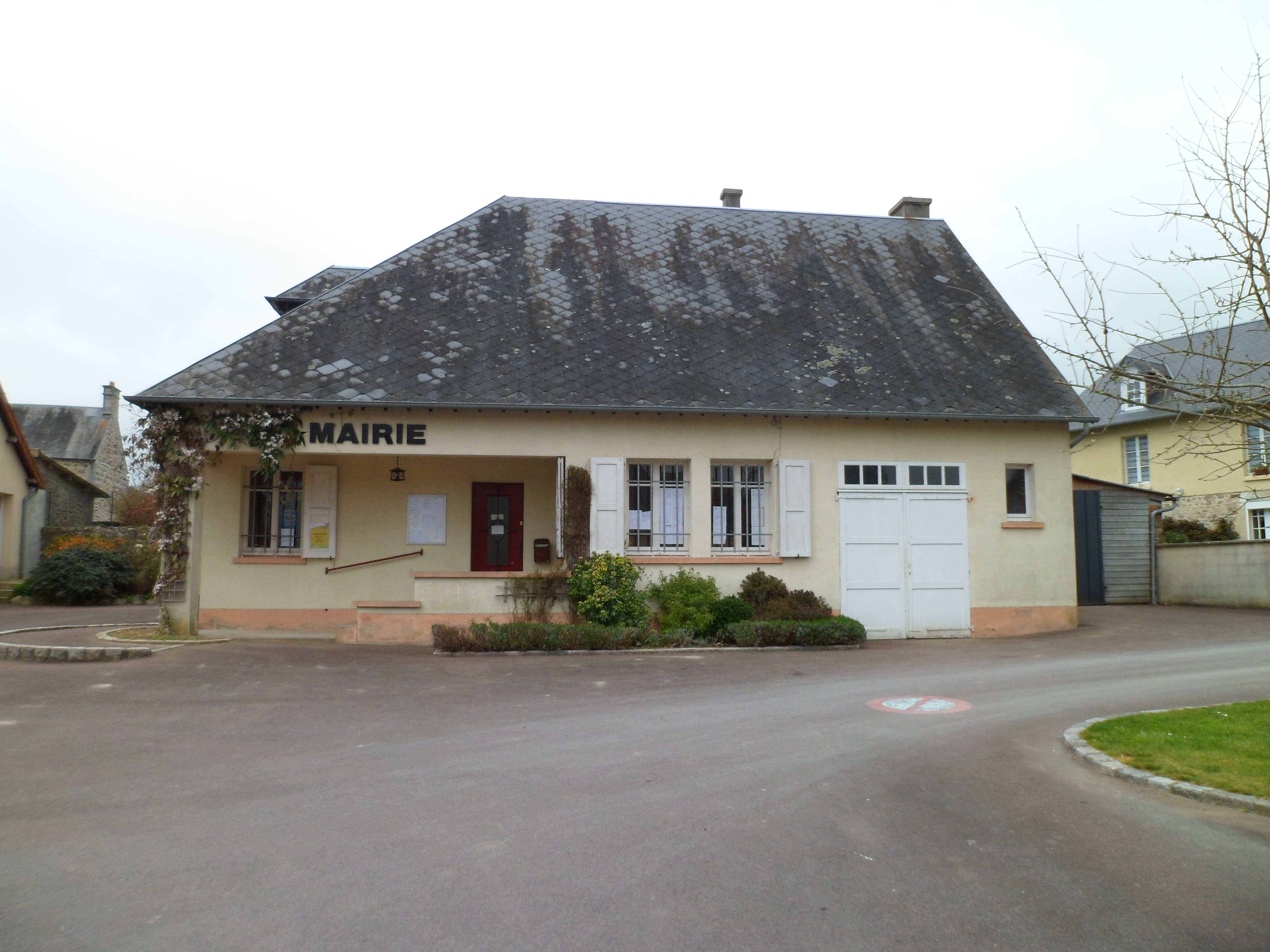 Feugères